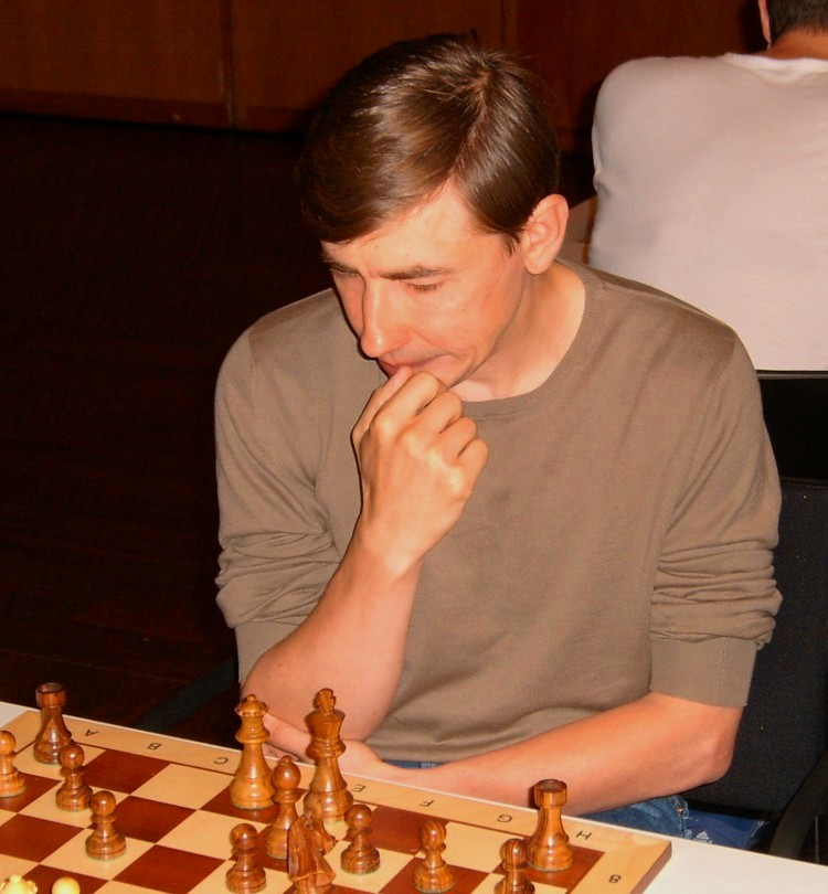 Jewgeni Ilgisowitsch Barejew, Russian chess grandmaster